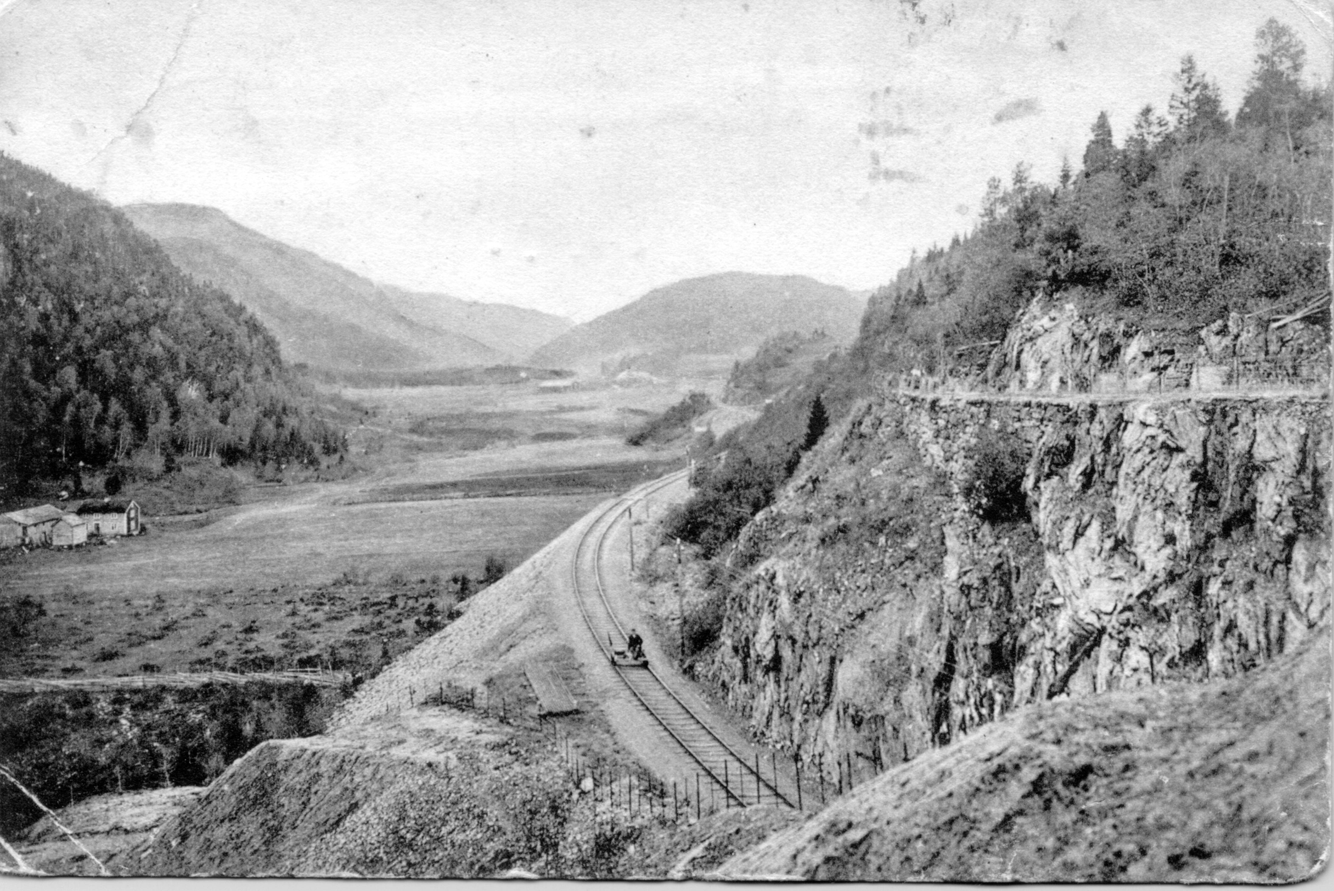 Vuddudalen i Åsen, sett fra Grubbåsen. Kleivtrøa (Kleiven østre, 220-13) ned til venstre. Lenger bak skimtes Vordal østre (220-1). Bildet skal være tatt i 1907. Fotograf: Ukjent Fotoeier: Åsen Museum og Historielag Digitalisering: Arne Langås Foto-ID: 001-0060